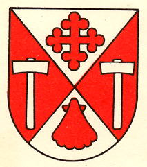 Wappen von Dorenaz Kanton Wallis Schweiz